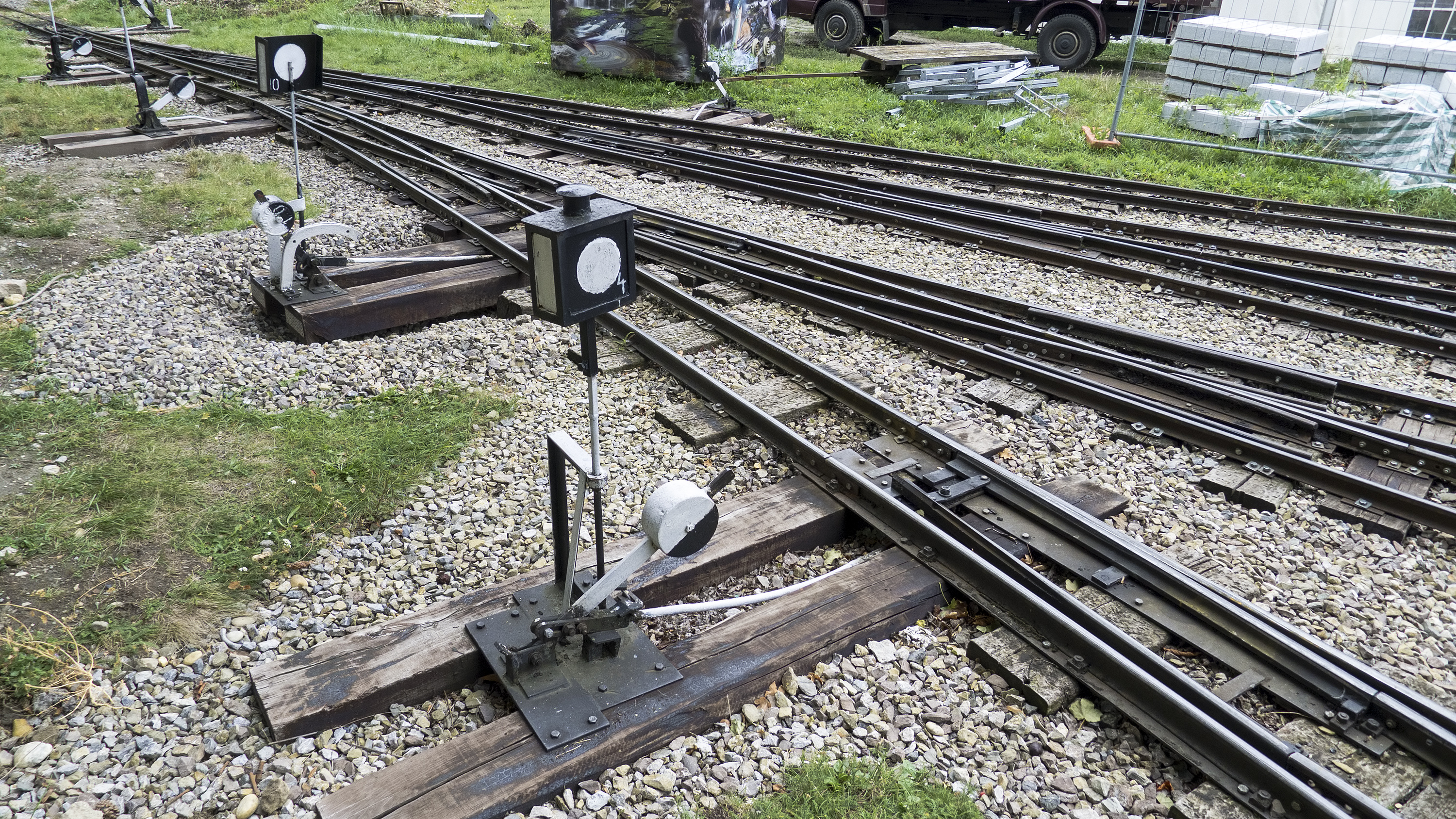 Liliputbahn im Wiener Prater in Wien 2, Weichen vor der Remise